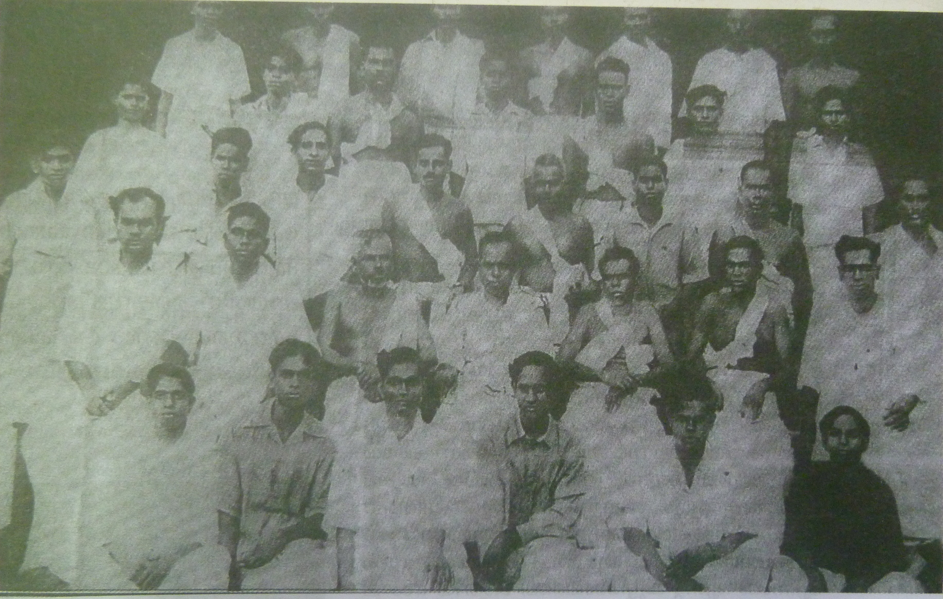 പെരിഞ്ചേരിയിലെ എഴുത്തച്ഛൻ യുവജന രക്ഷാസംഘം 1937 ൽ